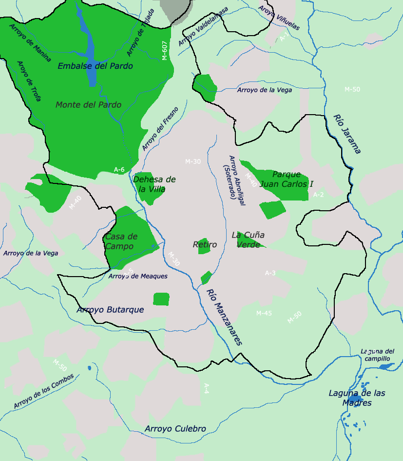 Mapa geográfico con los ríos y principales parques de la ciudad de Madrid.